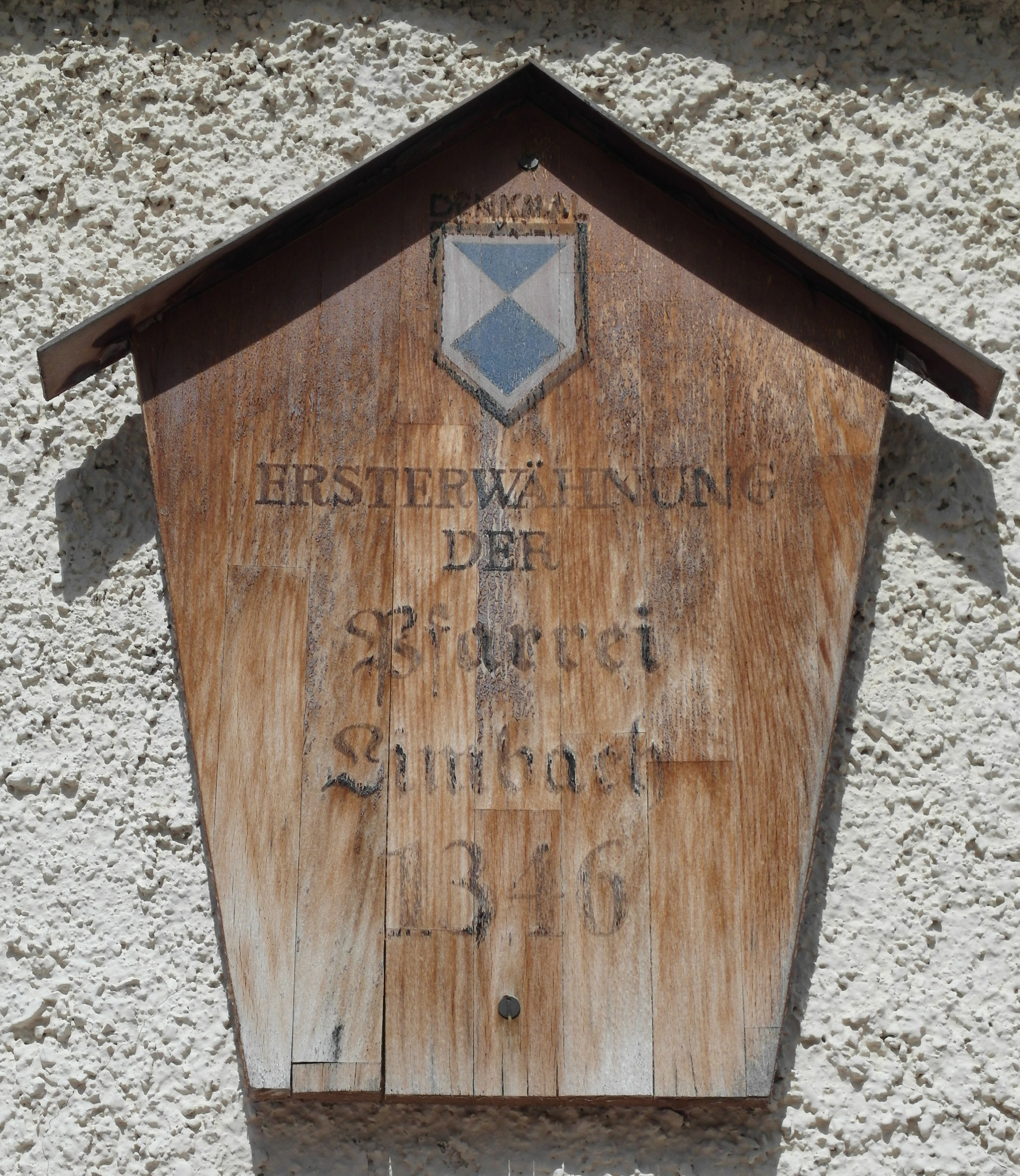 24.04.2017 09212 Limbach (Limbach-Oberfrohna): Evangelische Stadtkirche Limbach, Kirchstraße (GMP: 50.858131,12.767089). Erste Kirche 1346. [SAM9455.JPG]20170424185DR.JPG(c)Blobelt